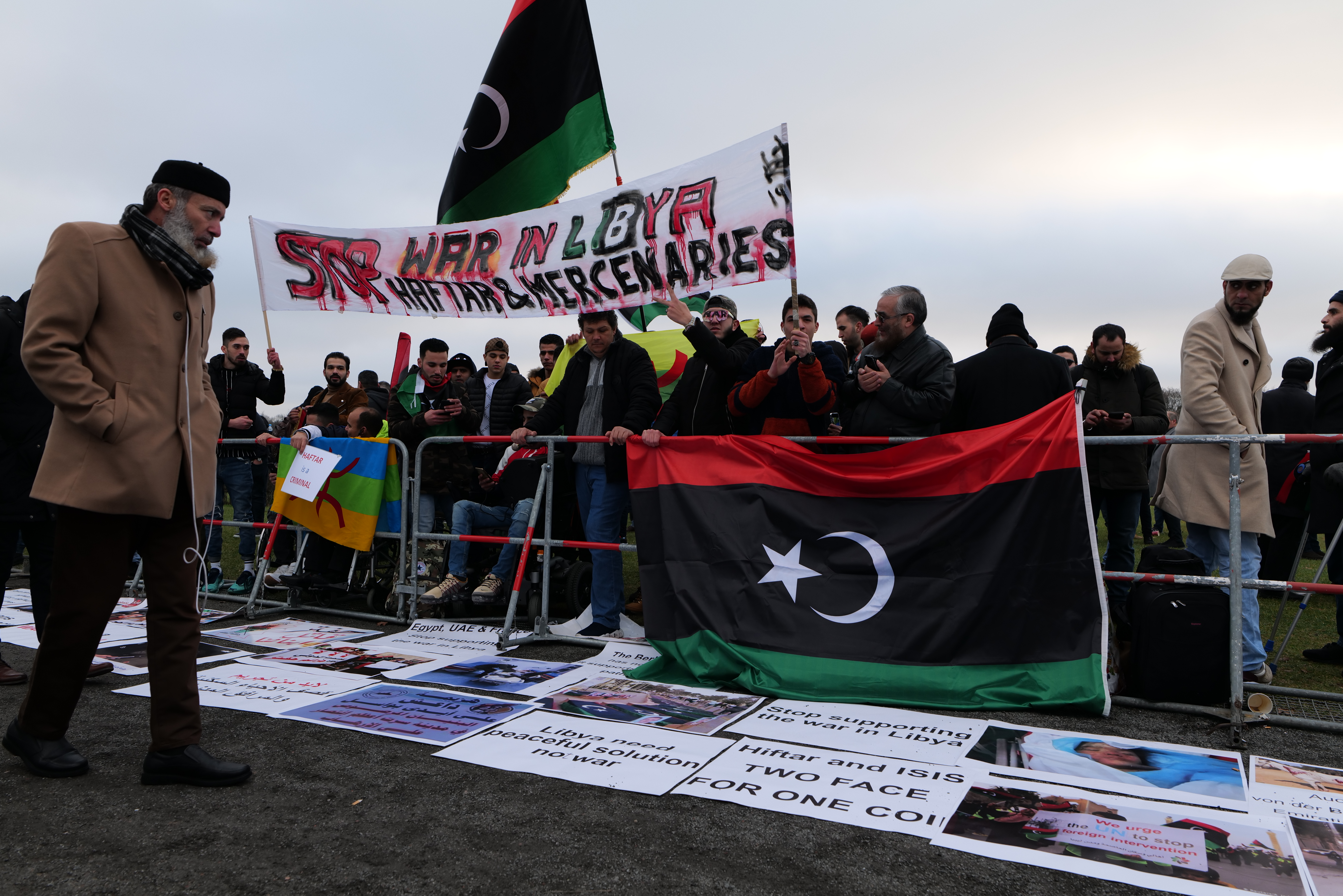 Demonstration gegen Haftar während der Libyen Konferenz am 19. Januar 2020 in Berlin.